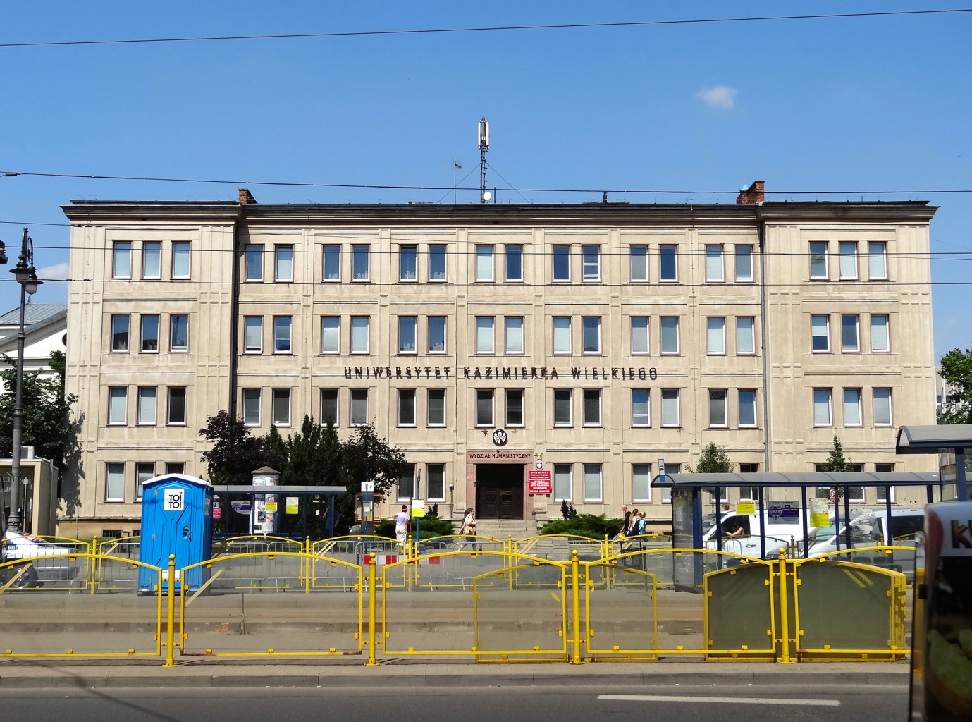 Budynek ul. Jagiellońska 11 w Bydgoszczy, należący do Uniwersytetu Kazimierza Wielkiego (Instytut Filologii Polskiej Wydziału Humanistycznego)